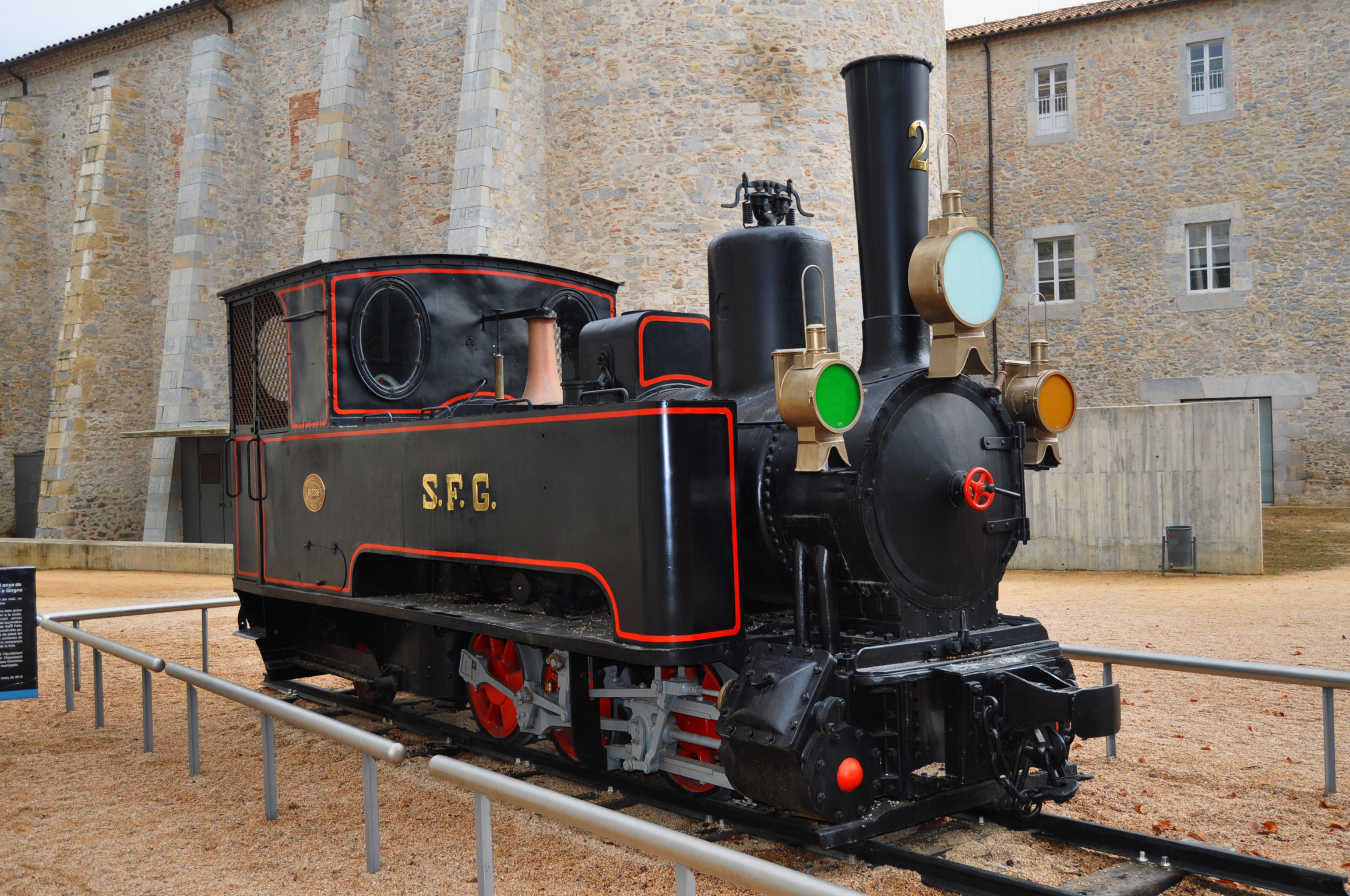 Locomotora del ferrocarril de la línia de Sant Feliu de Guíxols a Girona. Màquina construïda per Kraus & Cie l'any 1891, amb el número de placa del fabricant 2356. Fou la segona d'una comanda de quatre locomotores comprades per la companyia de ferrocarril per iniciar l'explotació de la línia. És propietat de l'Ajuntament de Girona, fou restaurada per l'Associació Amics del Ferrocarril de les Comarques Gironines amb la col·laboració de les brigades municipals i fou ubicada temporalment al davant de la Casa de Cultura el 3 de març de 2012. Imatge del novembre de 2014.